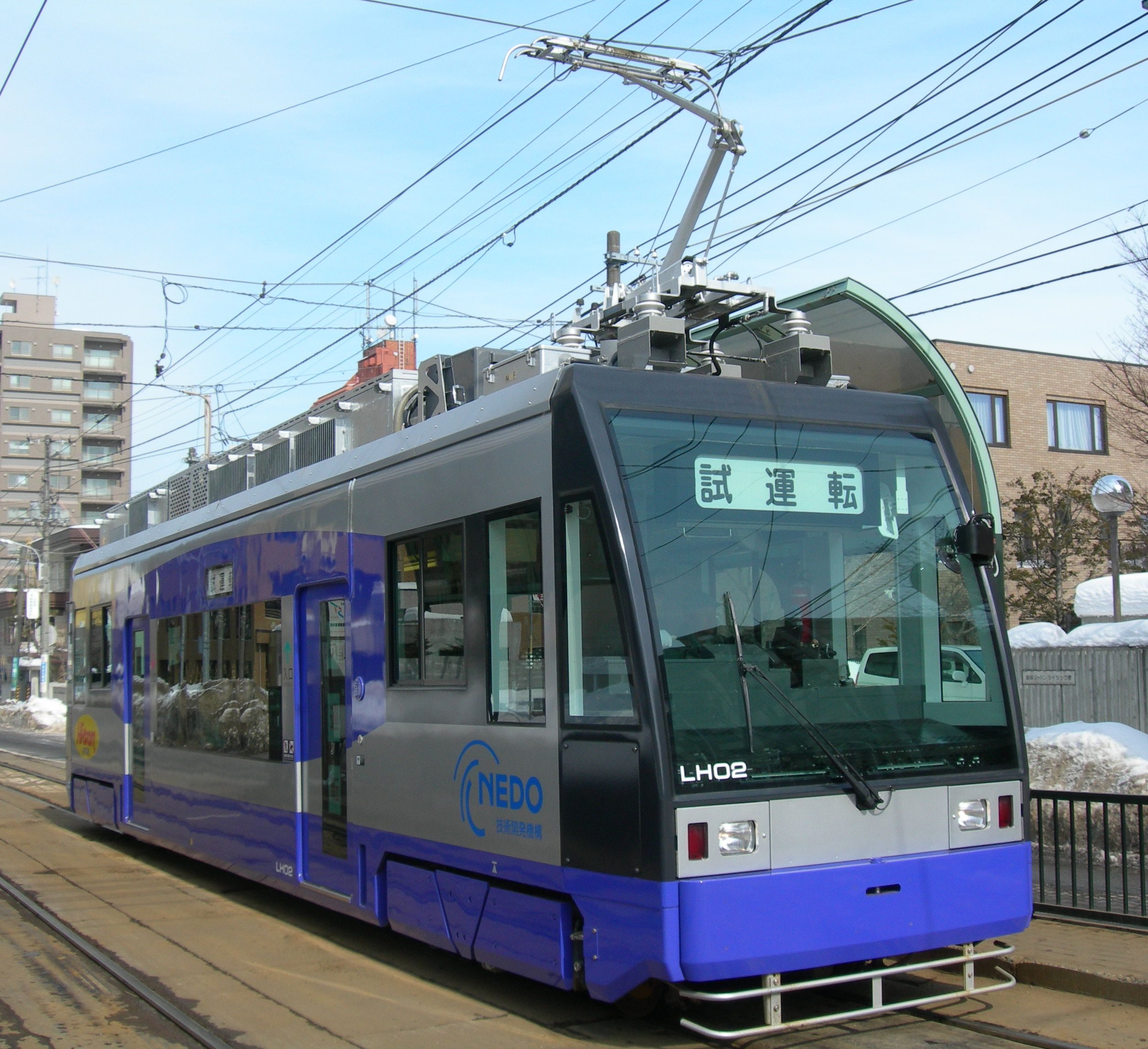 鉄道総研試験車両「Hi-tram」